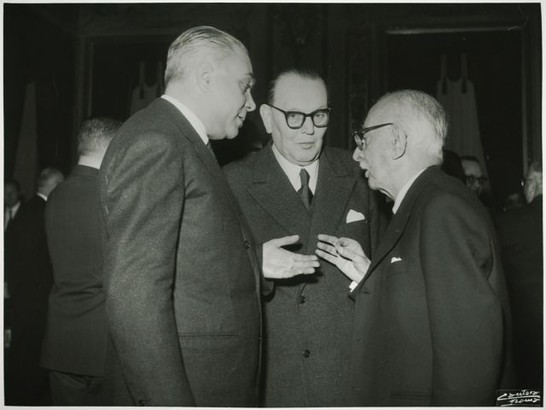 Auguri della Camera al Capo dello Stato